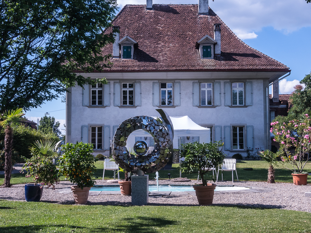 Seit 2013 ist der Metallplastiker Housi Knecht stolzer Besitzer des bescheidenen "Schlösschen" Rubigen, ein aus der Zeit der Berner Patrizier erhaltenes Herrenhaus im Dorf Rubigen Nähe Bern, Schweiz Den dazugehörenden Park hat er umgebaut für eine Skulpturen-Ausstellung seiner eigenen Werke.